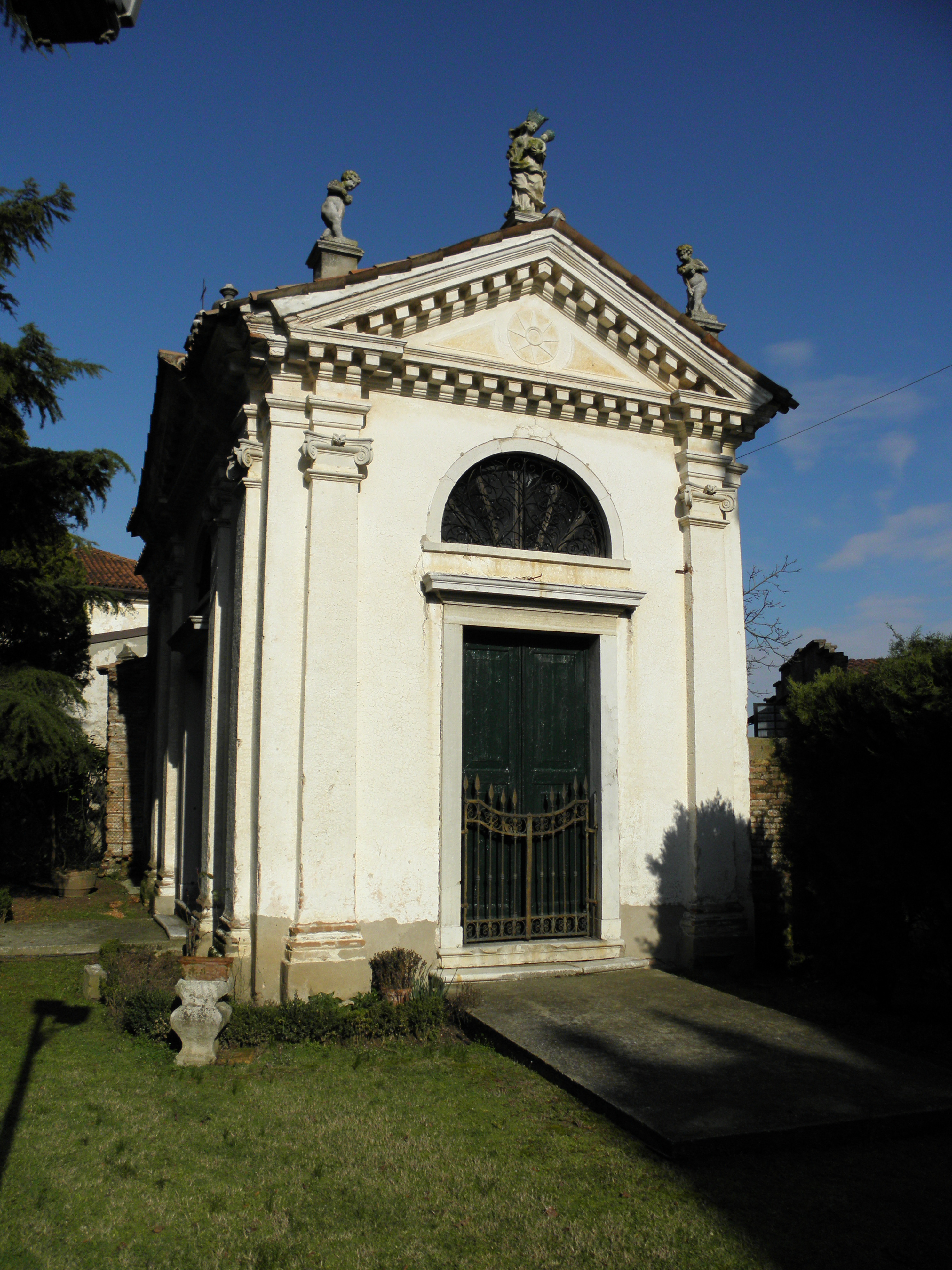 Campoverardo, frazione di Camponogara: l'oratorio della Beata Vergine del Rosario, parte del complesso di Villa Sargenti Giantin.